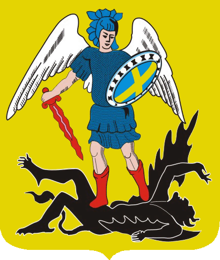 Герб Архангельской области без специальных почетных элементов, окружающих щит